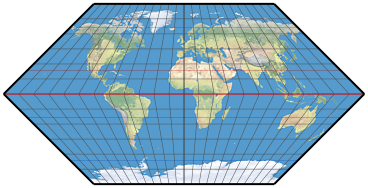 eckertovo zobrazeni